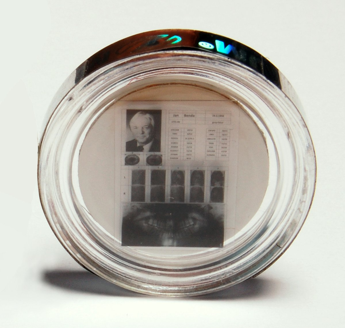 Biometrika